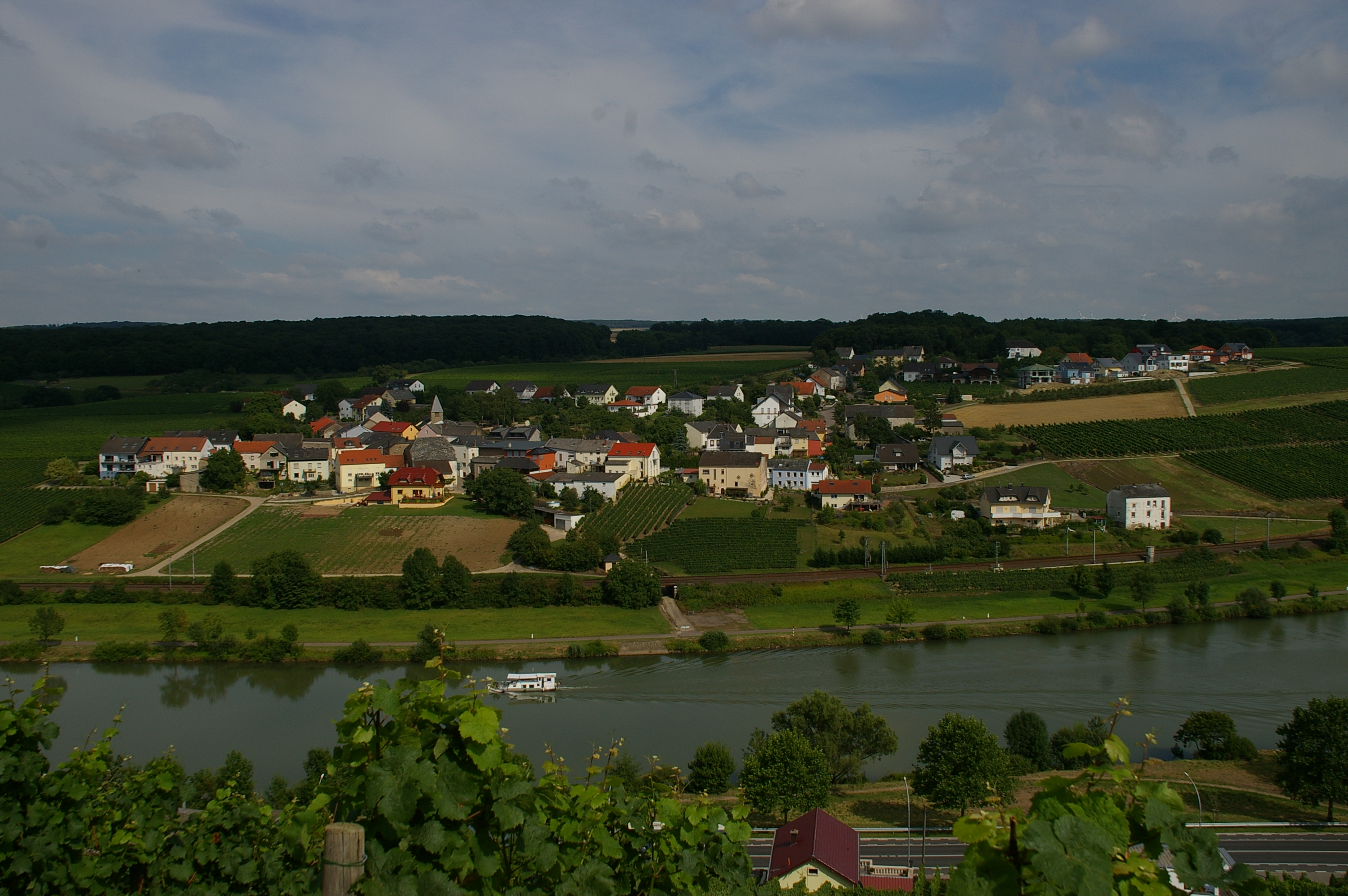 Ortslage Palzem-Wehr